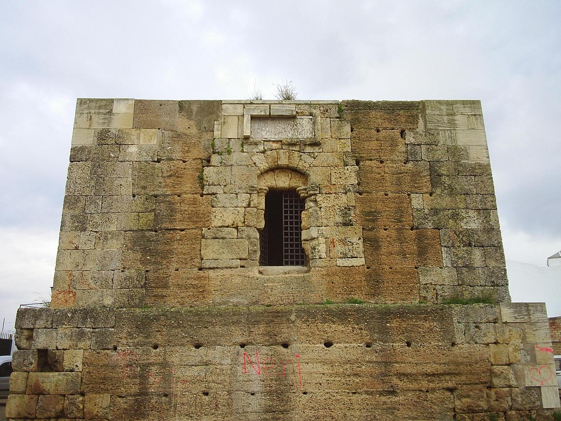 Torre mocha, llamada de Don Fadrique. Situada en la localidad de Albaida del Aljarafe (Sevilla). Por su excelente situación era utilizada para la vigilancia de la frontera con el reino musulmán de Niebla.